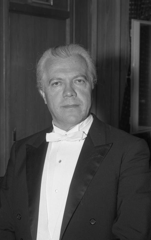 Konzert u. Empf. in der La. Vertr. Baden-Württemberg (Stuttg. Kommerorchester unter Prof. Mündinger)